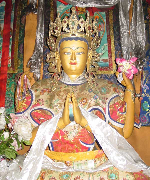 Author: Kosi Gramatikoff; Photography: Kosi Gramatikoff; Tsozong Gongba Mongastery - Avalokiteshvara (or Avalokiteśvara), at Tsozong Gongba Monastery